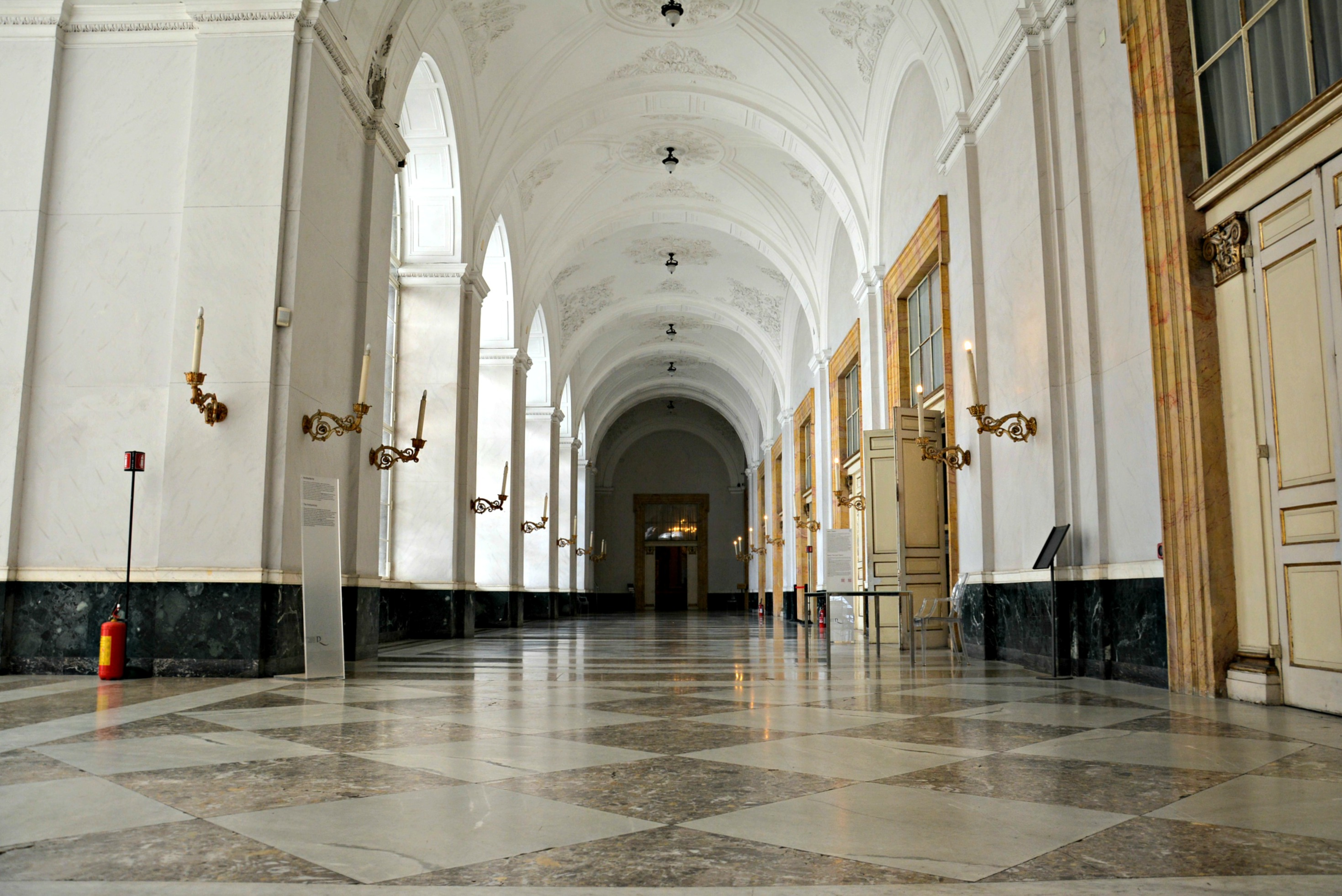 Vedi titolo